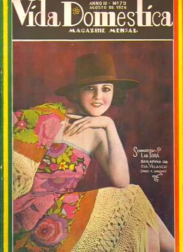 Capa da revista brasileira Vida Doméstica nº 79, de agosto 1924, trazendo na capa a atriz e bailarina brasileira Lia Torá.